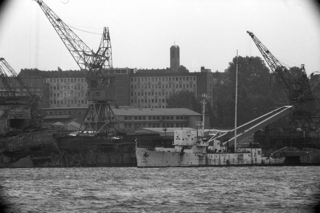 liegt zur Verschrottung am Kai der Dietrichsdorfer Werke der Howaldtswerke Deutsche Werft AG (HDW) in der Schwentinemündung. Von 1964 bis 1970 lag es als Piratensender in der Themsemündung in London. 1975 als Schrott zu HDW.